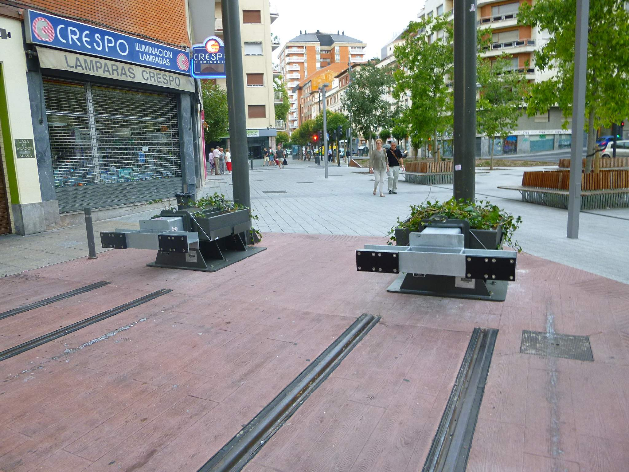 Tranvía de Vitoria